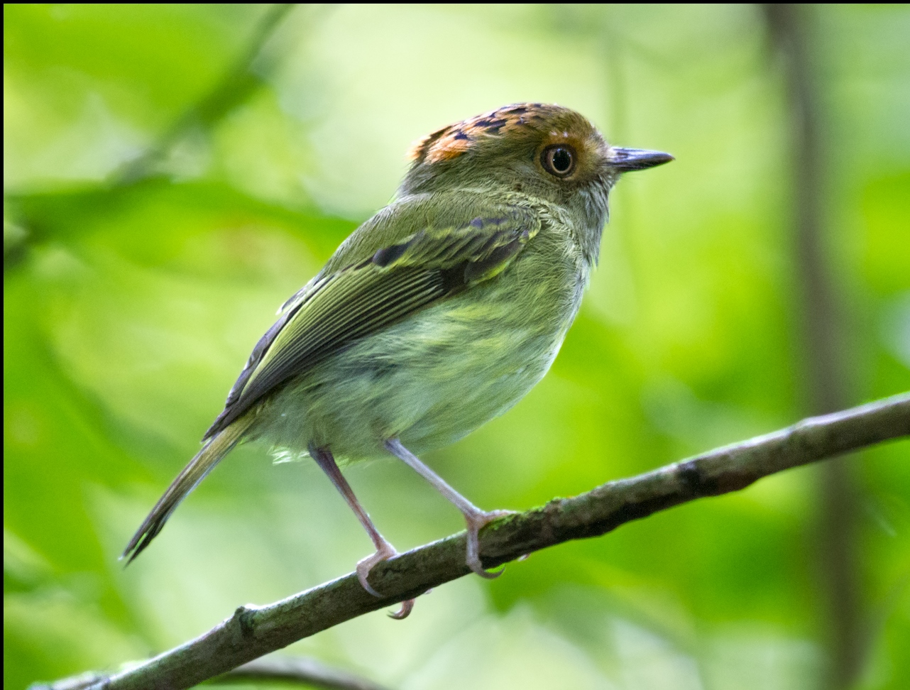 Upala, Costa Rica